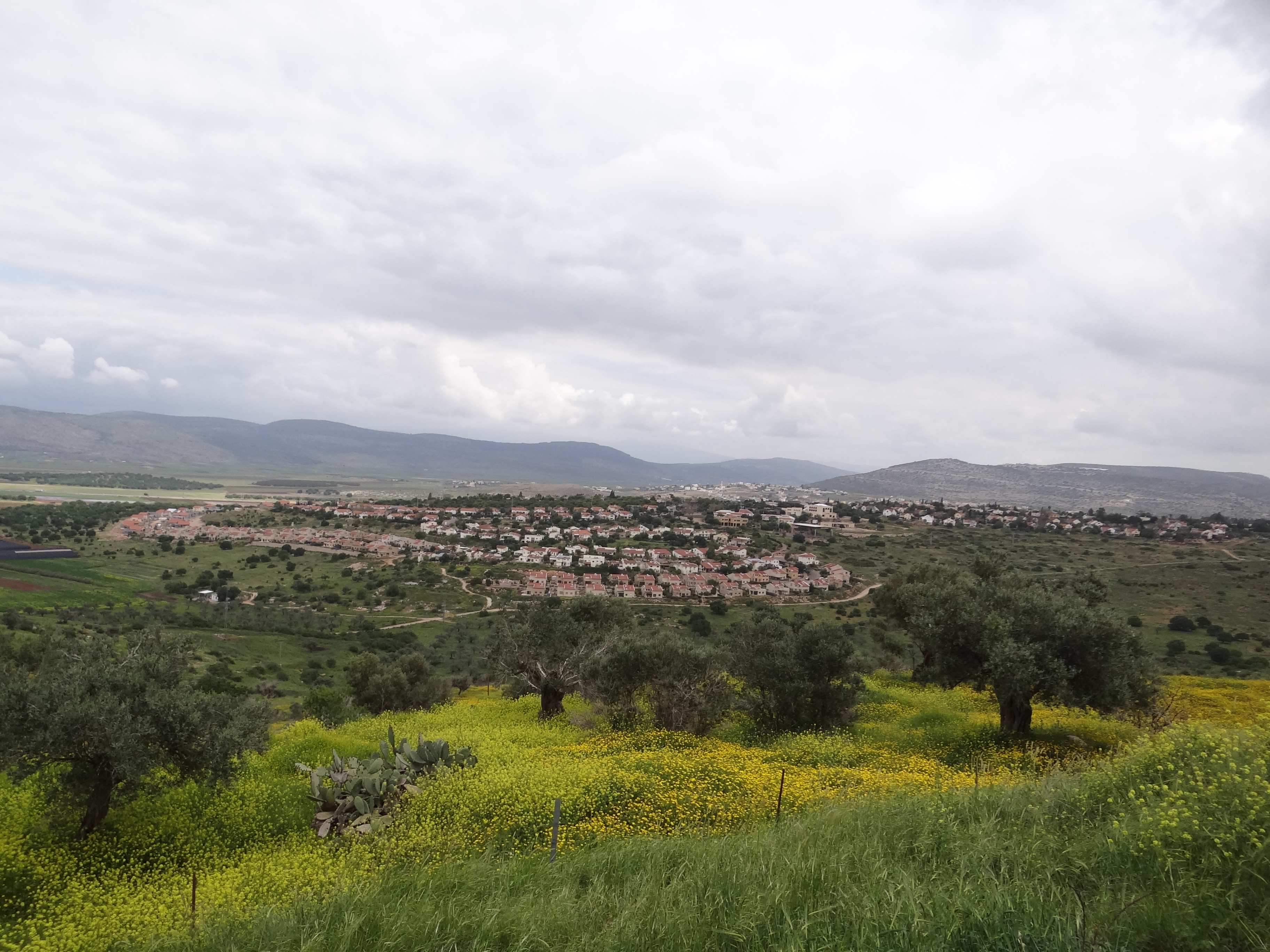 Hoshaya, Israel הושעיה בגליל